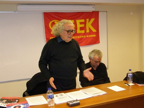 Savas Matsas, dirigente del Partido Revolucionario de los Trabajadores griego durante una charla.